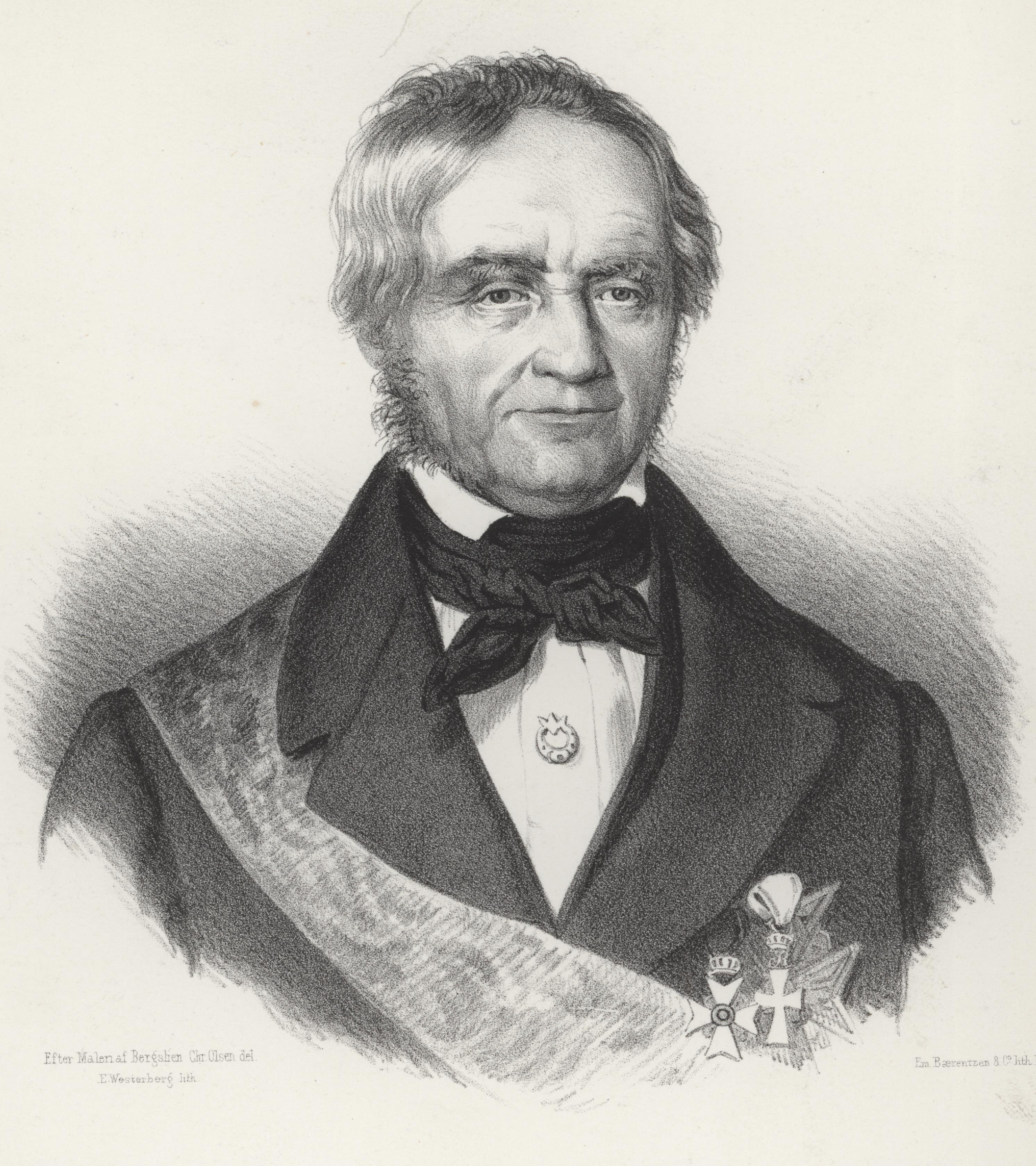 Format: Litografi etter maleri av Bergslien. Dato / Date: Ukjent Kunstner / Artist: Chr. Olsen - E. Westerberg lith. / Em. Bærentzen & Co. lith. Eier / Owner Institution: Trondheim byarkiv, The Municipal Archives of Trondheim Arkivreferanse / Archive reference: Tor.H49.B04.F24000 Merknad: Medfølgende billedtekst: Hilmar Meinche Krogh (1776-1851). Eidsvollsmann 1814. Stiftamtmann i Trondhjem, fra 1814. Portret. Efter maleri af Bergslien.